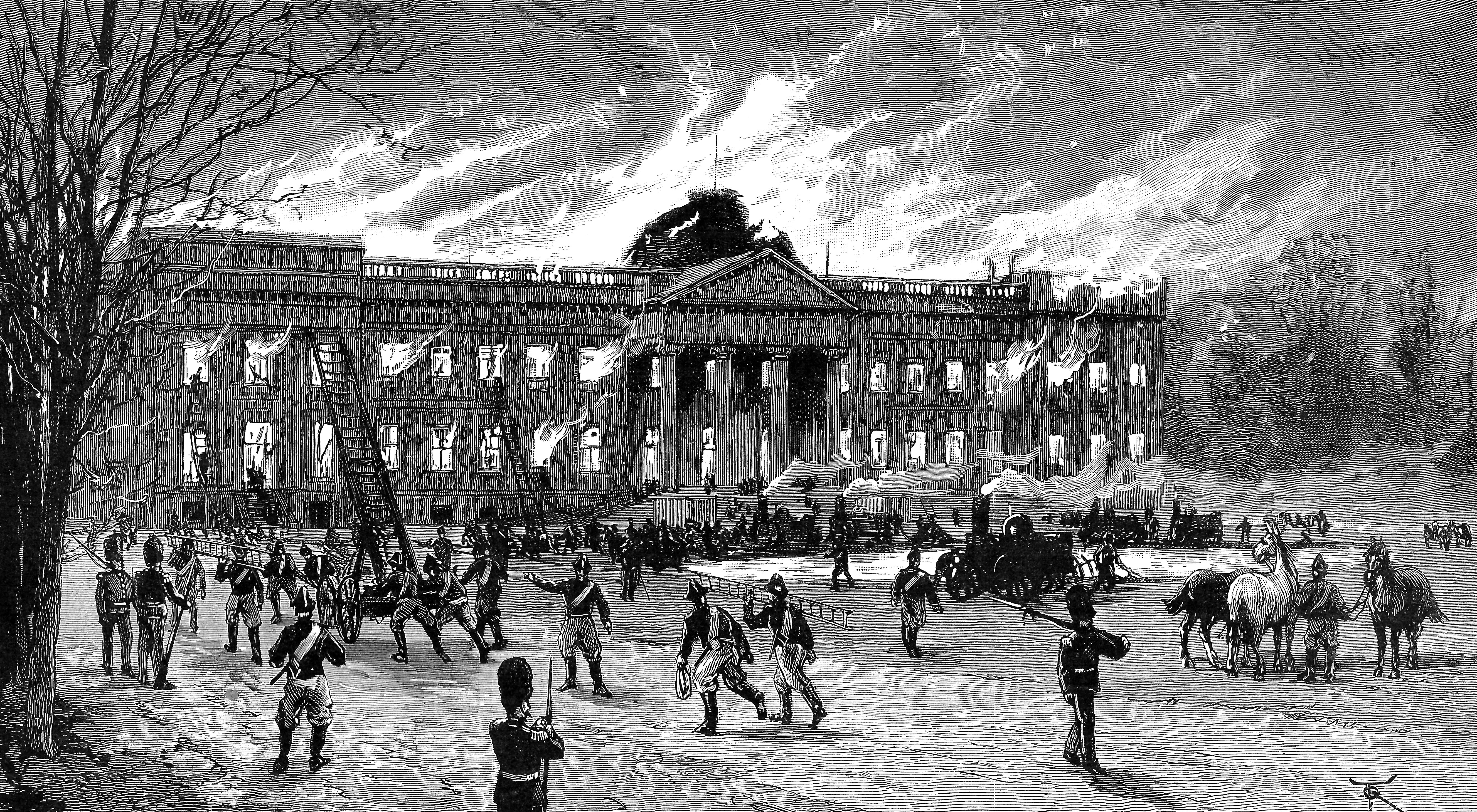 The Royal Castle of Laeken on fire, 1 January 1890. Incendie du château royal de Laeken, le 1 janvier 1890. Het koninklijk kasteel van Laken in brand, 1 januari 1890.